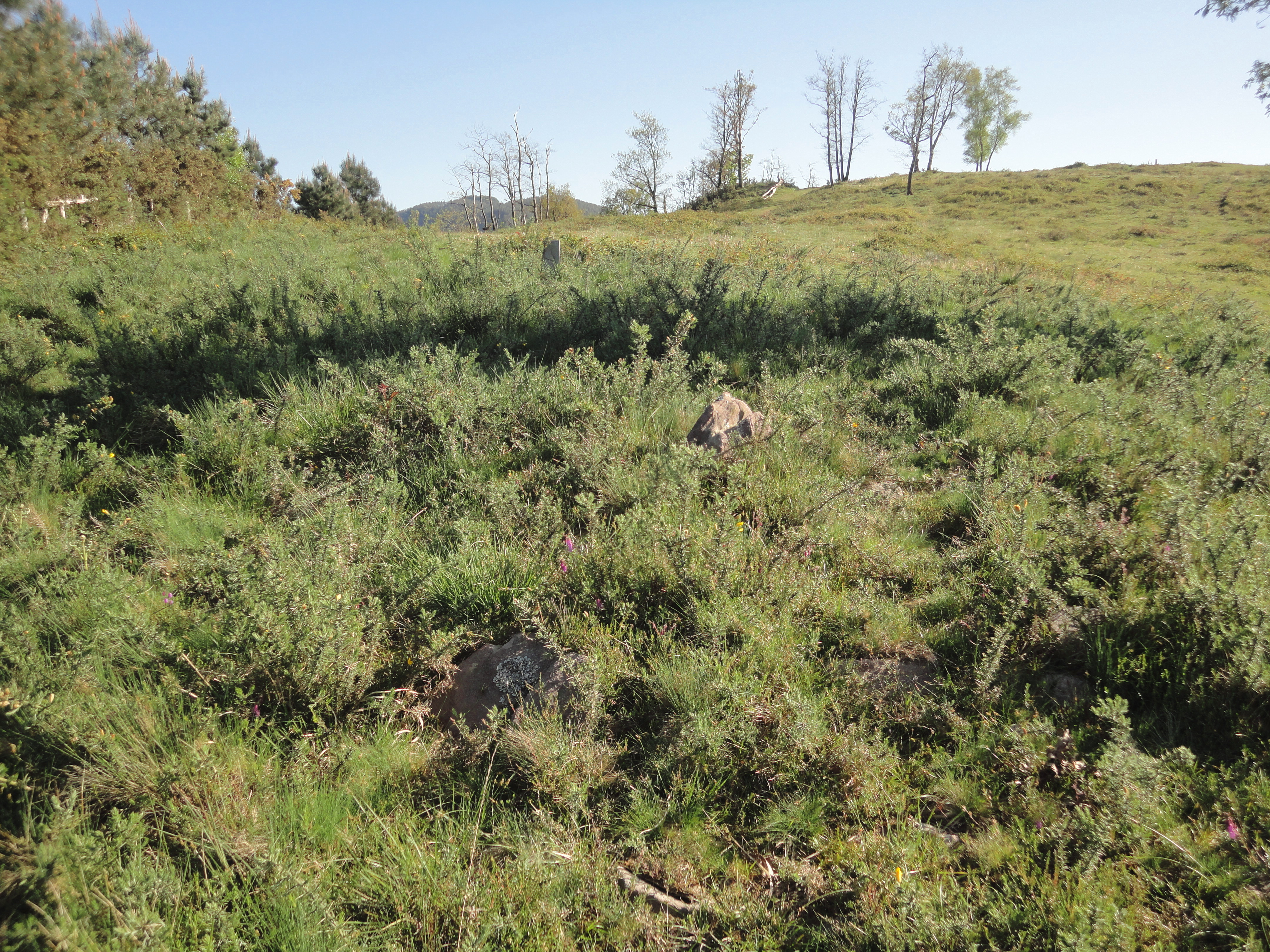 Oindolar IV trikuharria